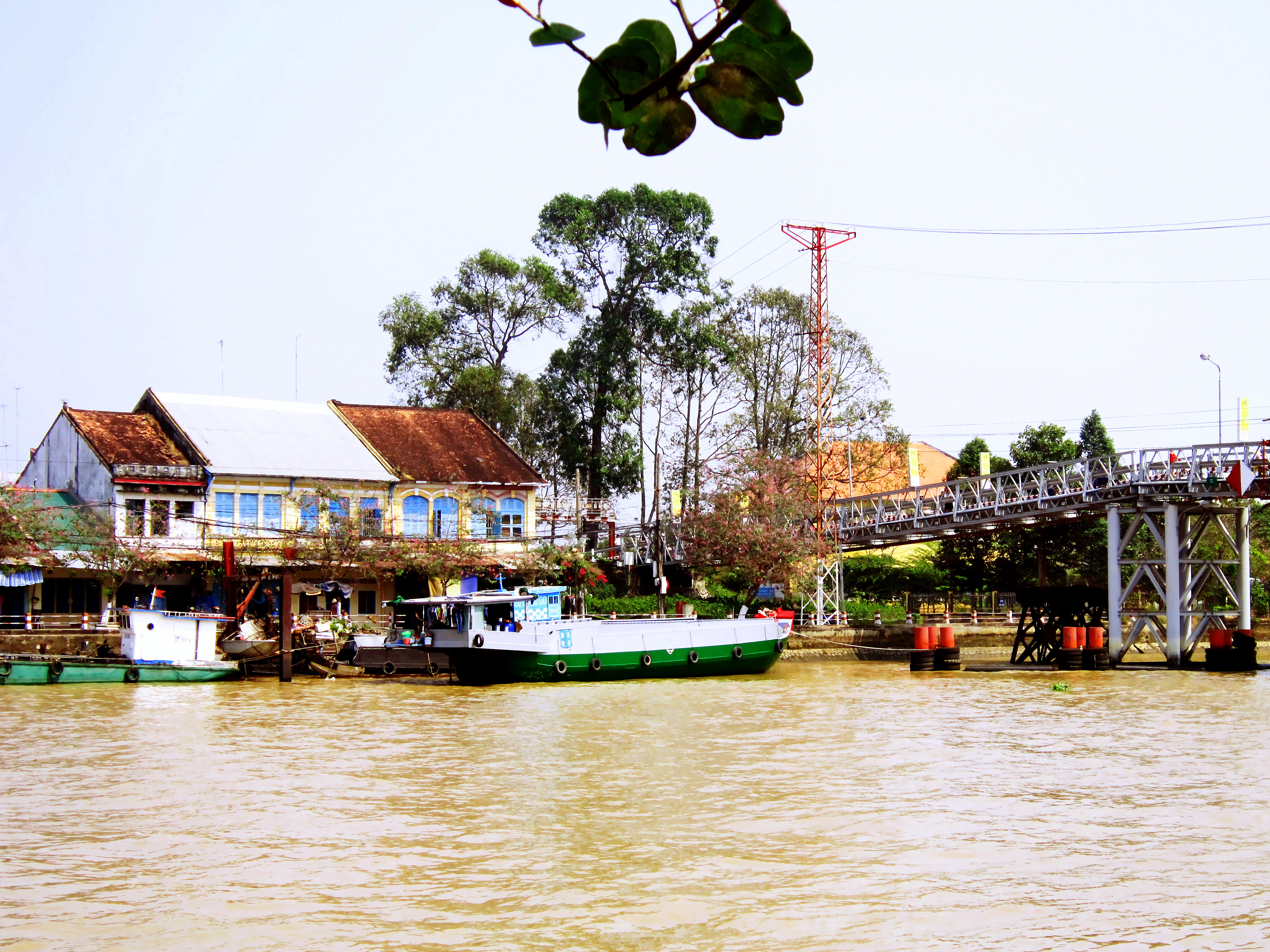 Phong cảnh chỗ cầu sắt Sa Đéc, thuộc phường 3, Tp Sa Đéc, tỉnh Đồng Tháp, Việt Nam.